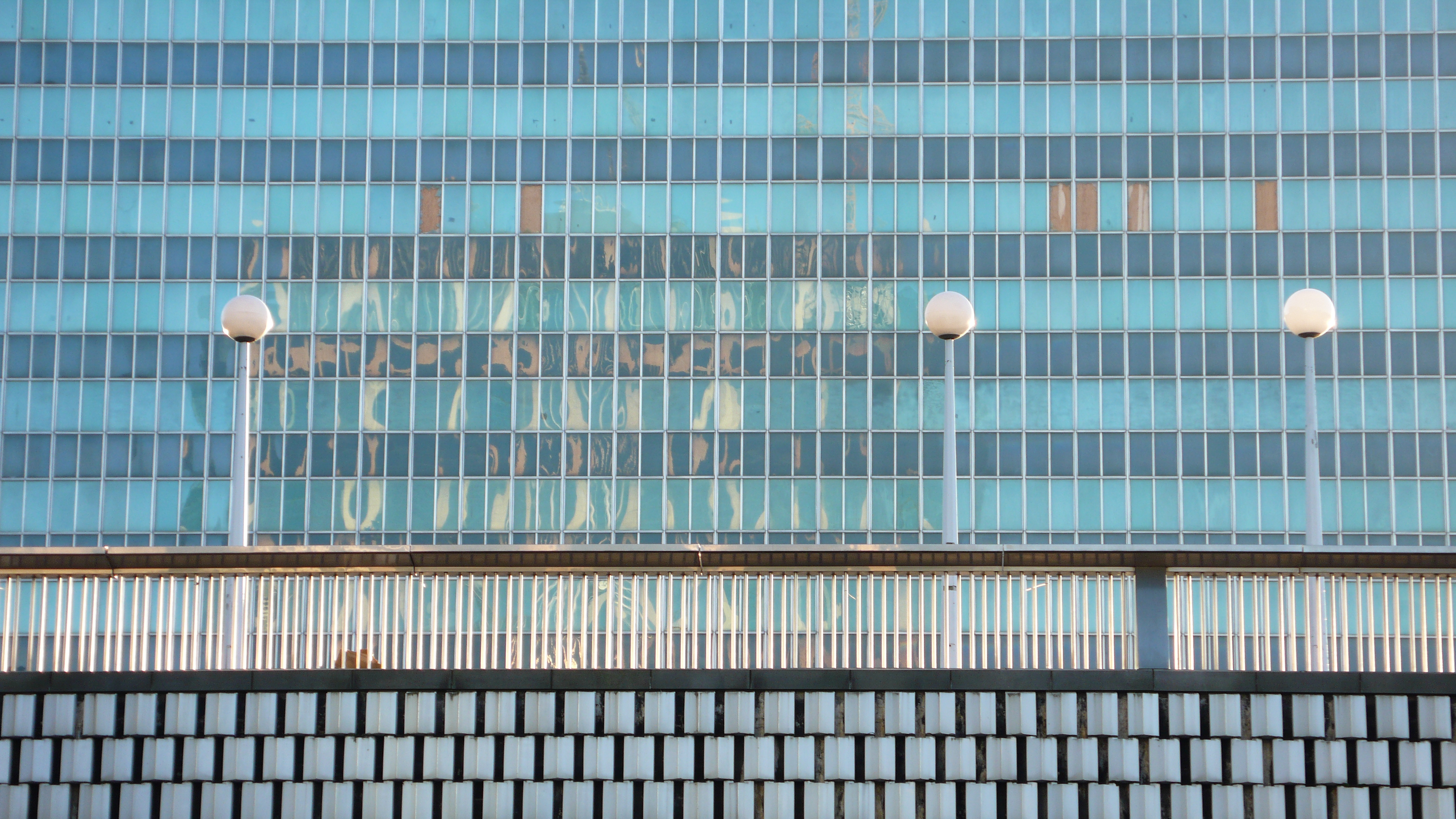 La Cité Administrative de l'Etat vue en contre-bas de l'Esplanade Vésale